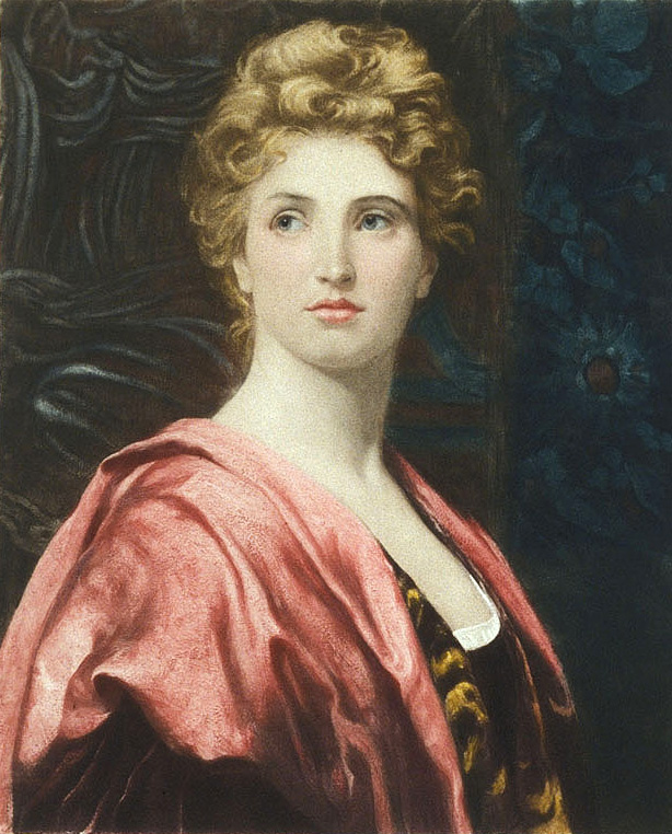 Beatrice